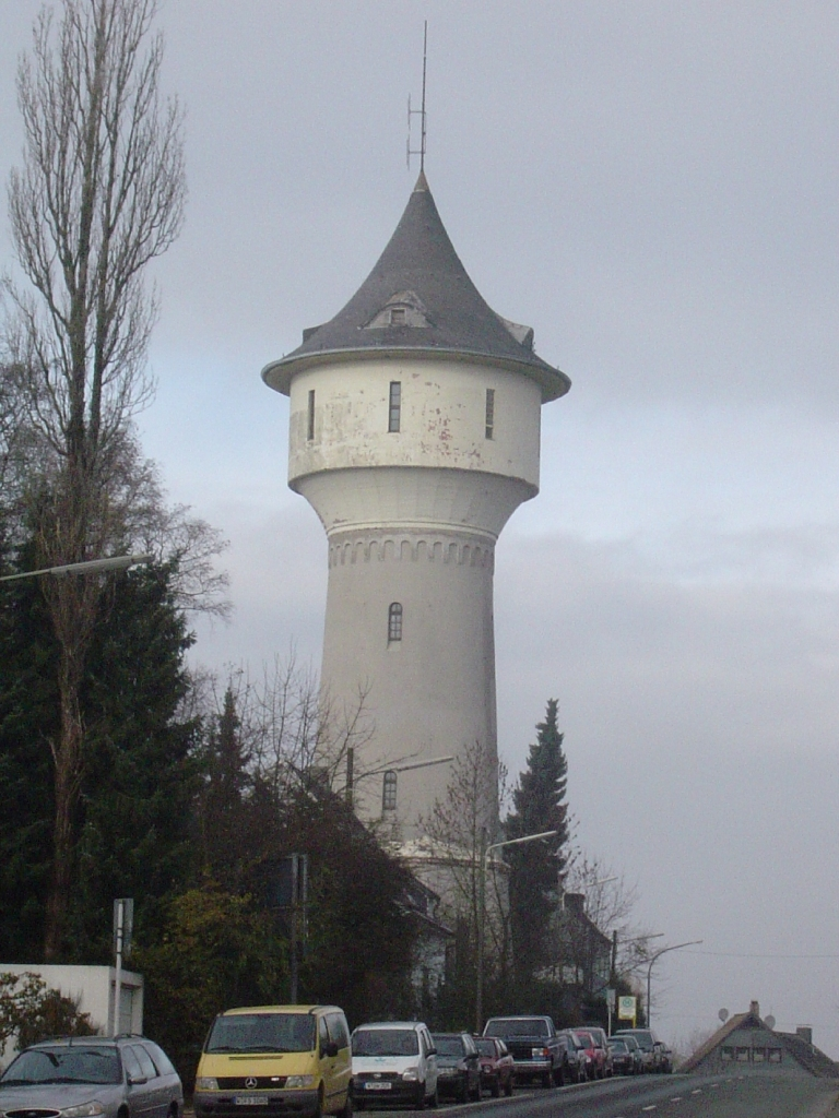 Alter Wasserturm in Wuppertal-Hatzfeld selbst fotografiert von Pitichinaccio, 25. November 2005